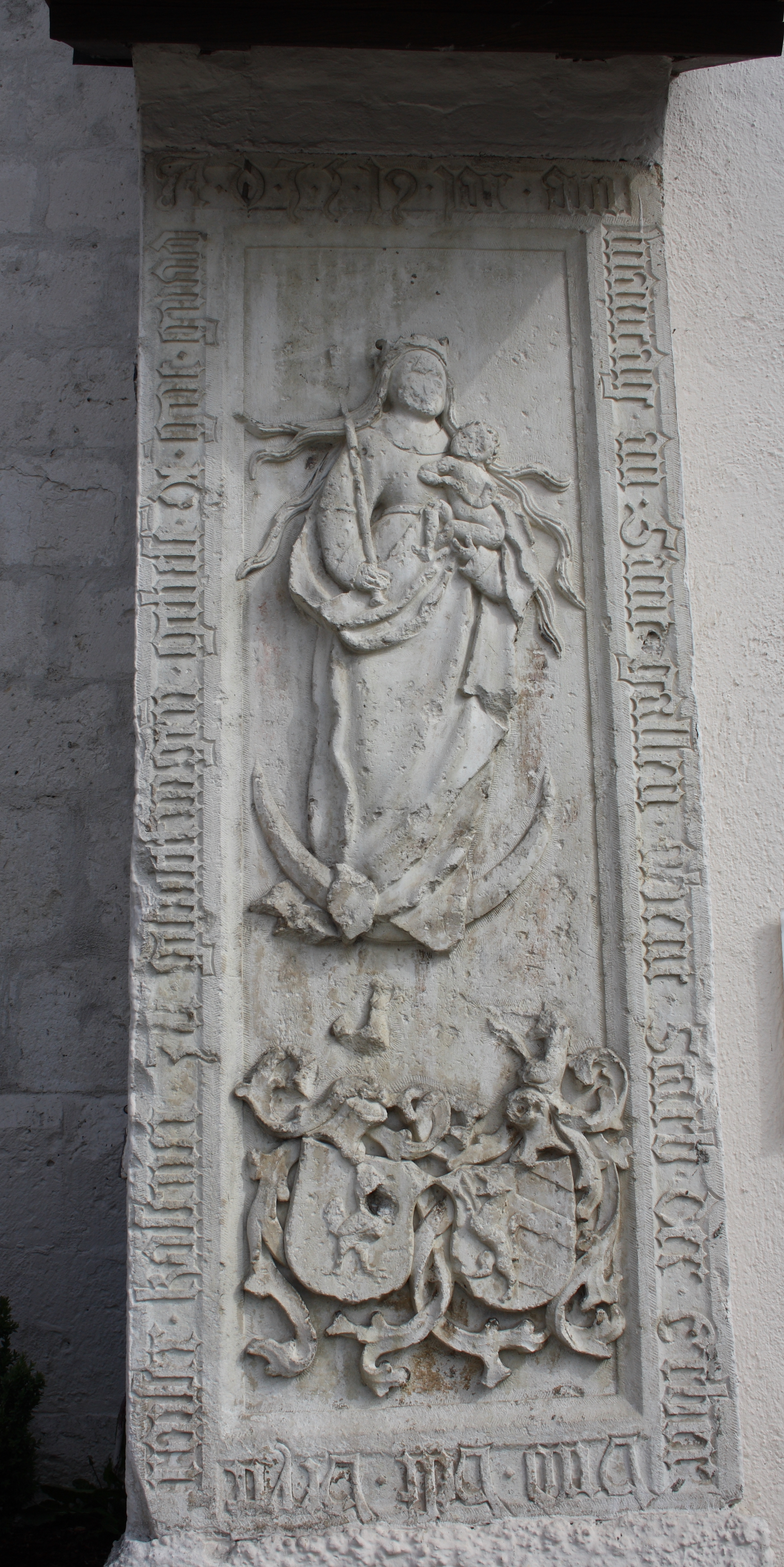 Epitaph für Veydt Raiser in der katholischen Stadtpfarrkirche St. Martin in Gundelfingen an der Donau